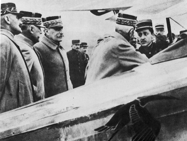 Guynemer parle aux généraux en 1917